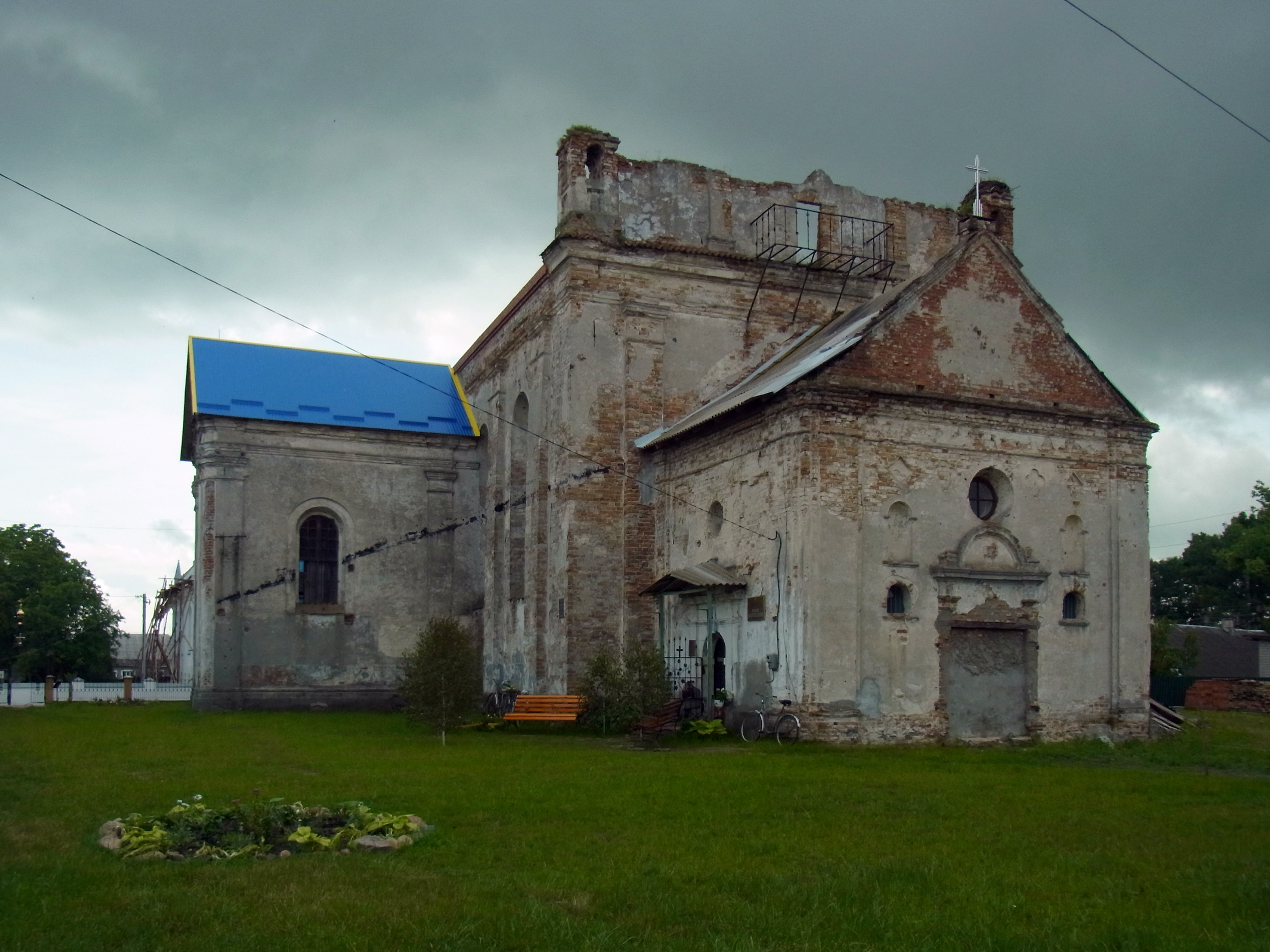 Костел Анни (мур.) (16 ст.) - вигляд з північного заходу - Луків Турійський район Волинська область Україна